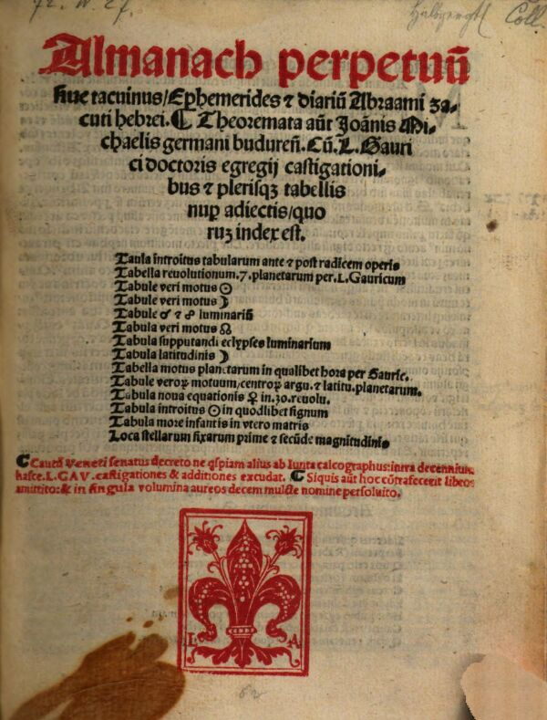 Deckblatt des Almanach perpetuum, 1502 bzw. 1525